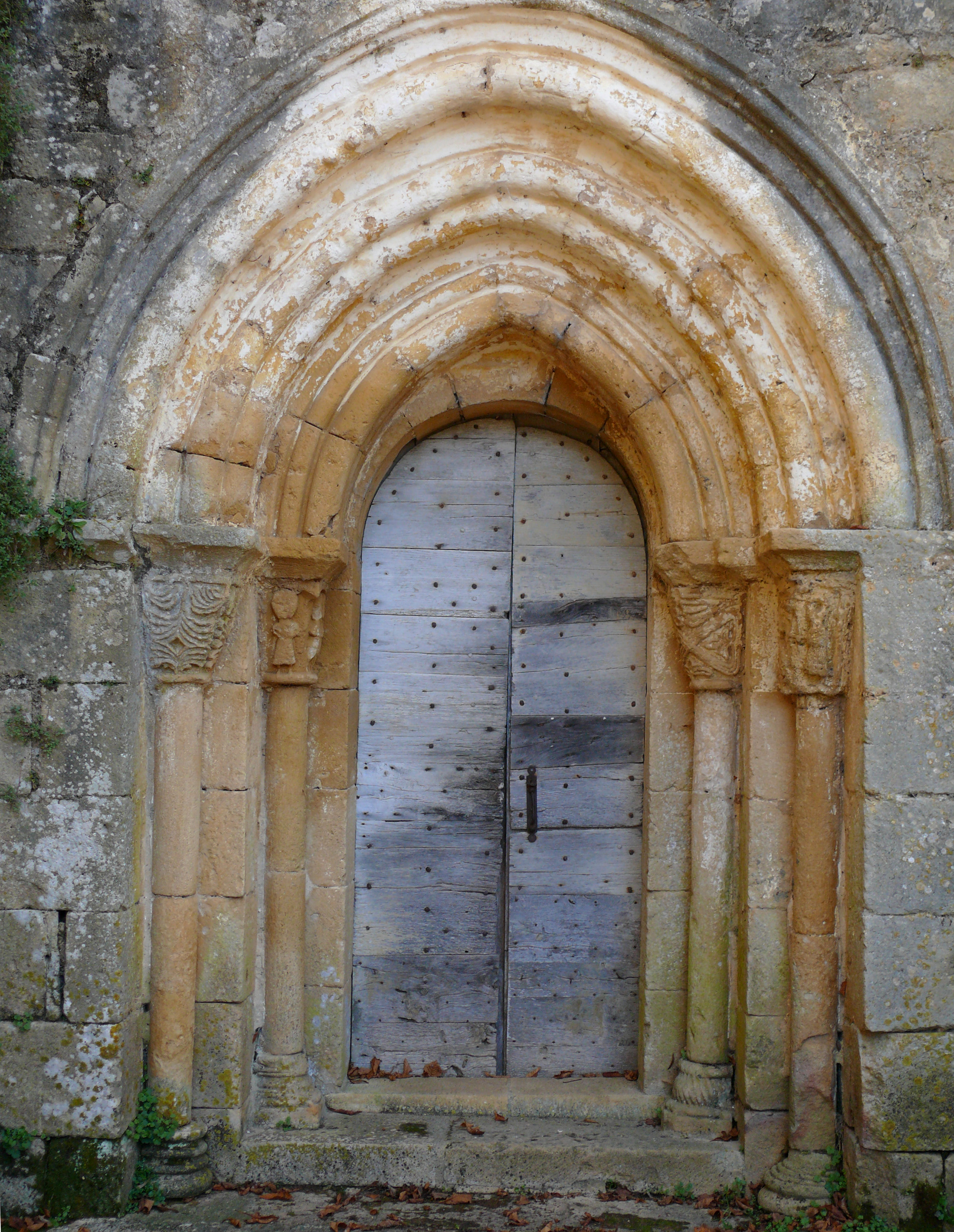 Fajoles - Eglise de l'Assomption - Porte donnant accès au bras droit du transept